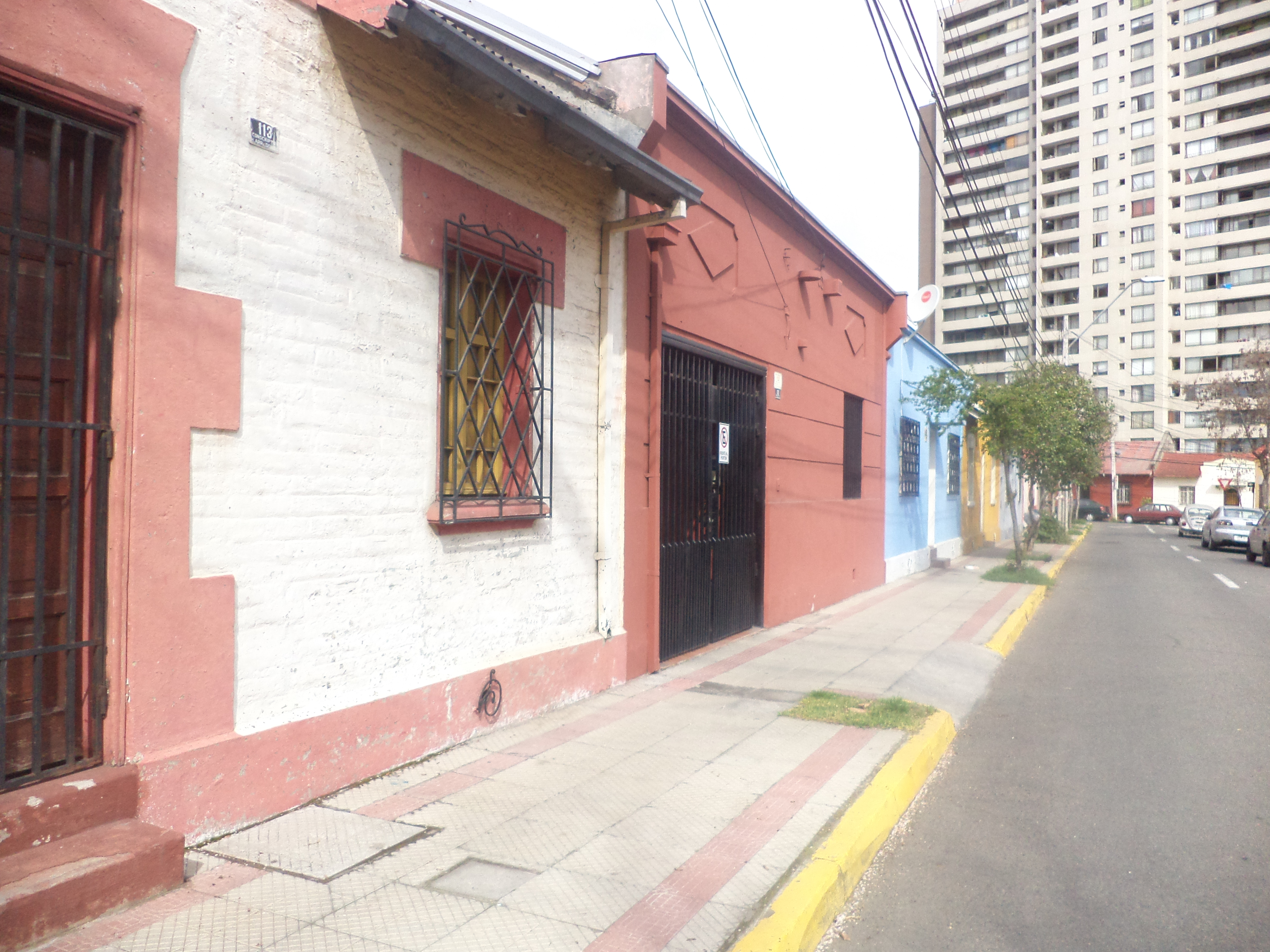 Población para Suboficiales de la Escuela de Aplicación de Caballería This is a photo of a national monument in Chile: 2092